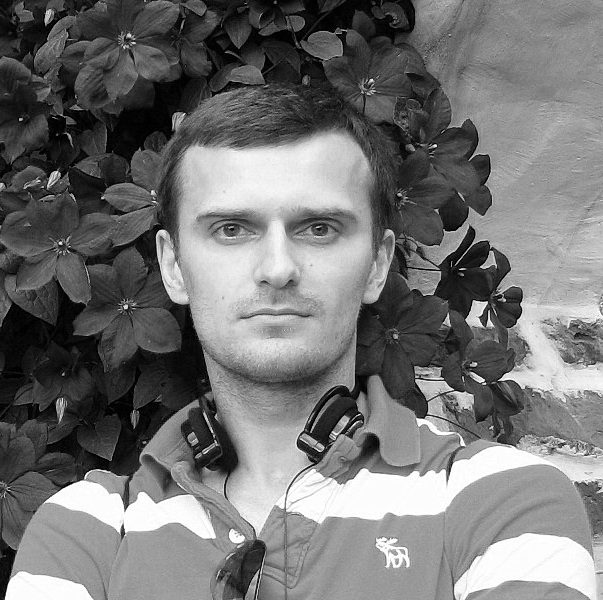 Алексей Валерьевич Овечкин. Портрет. г. Рига